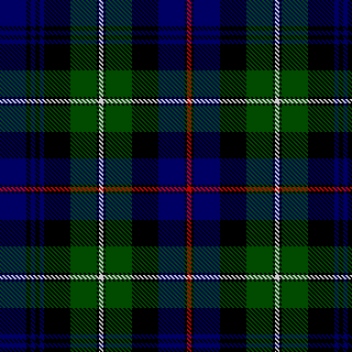 Mackenzie Modern Tartan